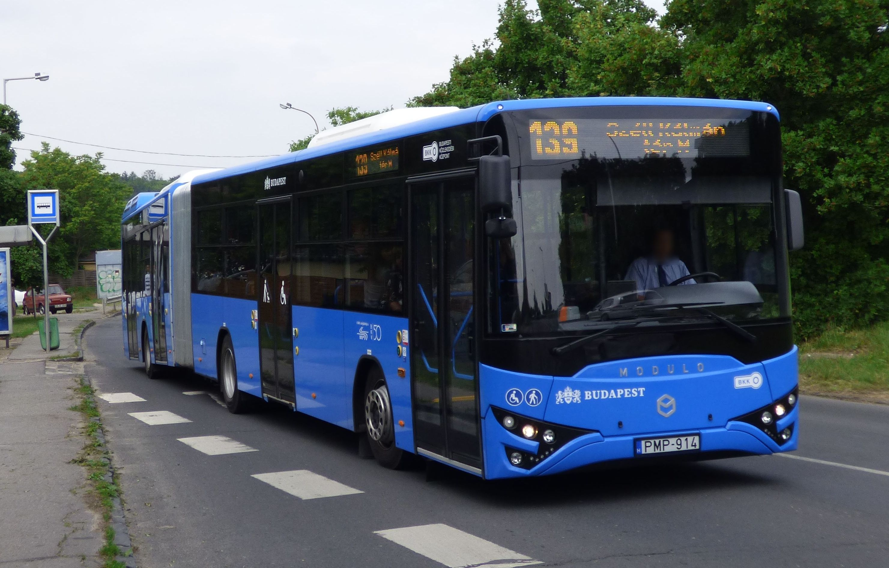 139-es jelzésű Modulo M168d busz a Lapu utcában (frsz. PMP-914)